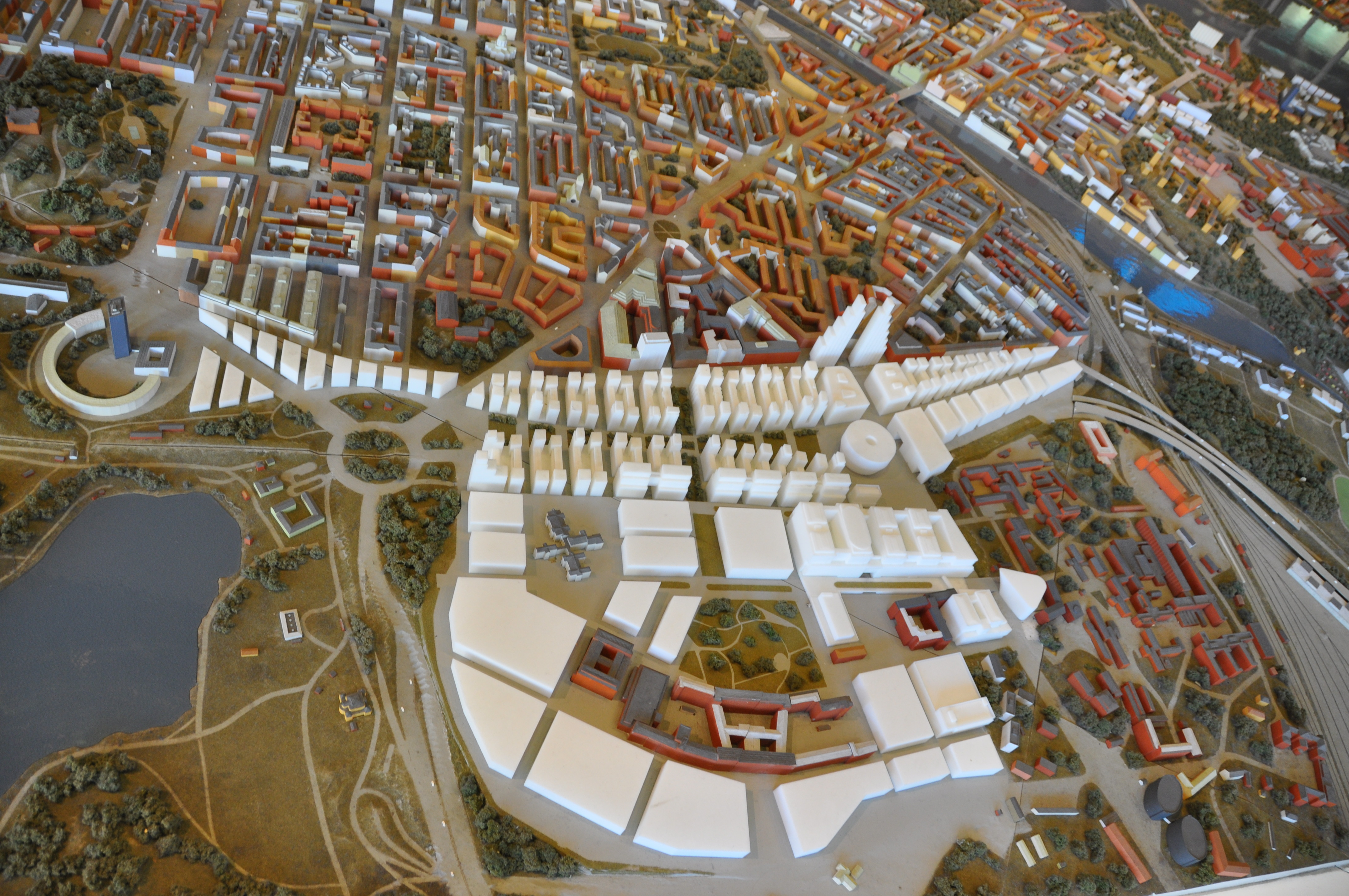 Hagastaden, modell på Kulturhuset 2011